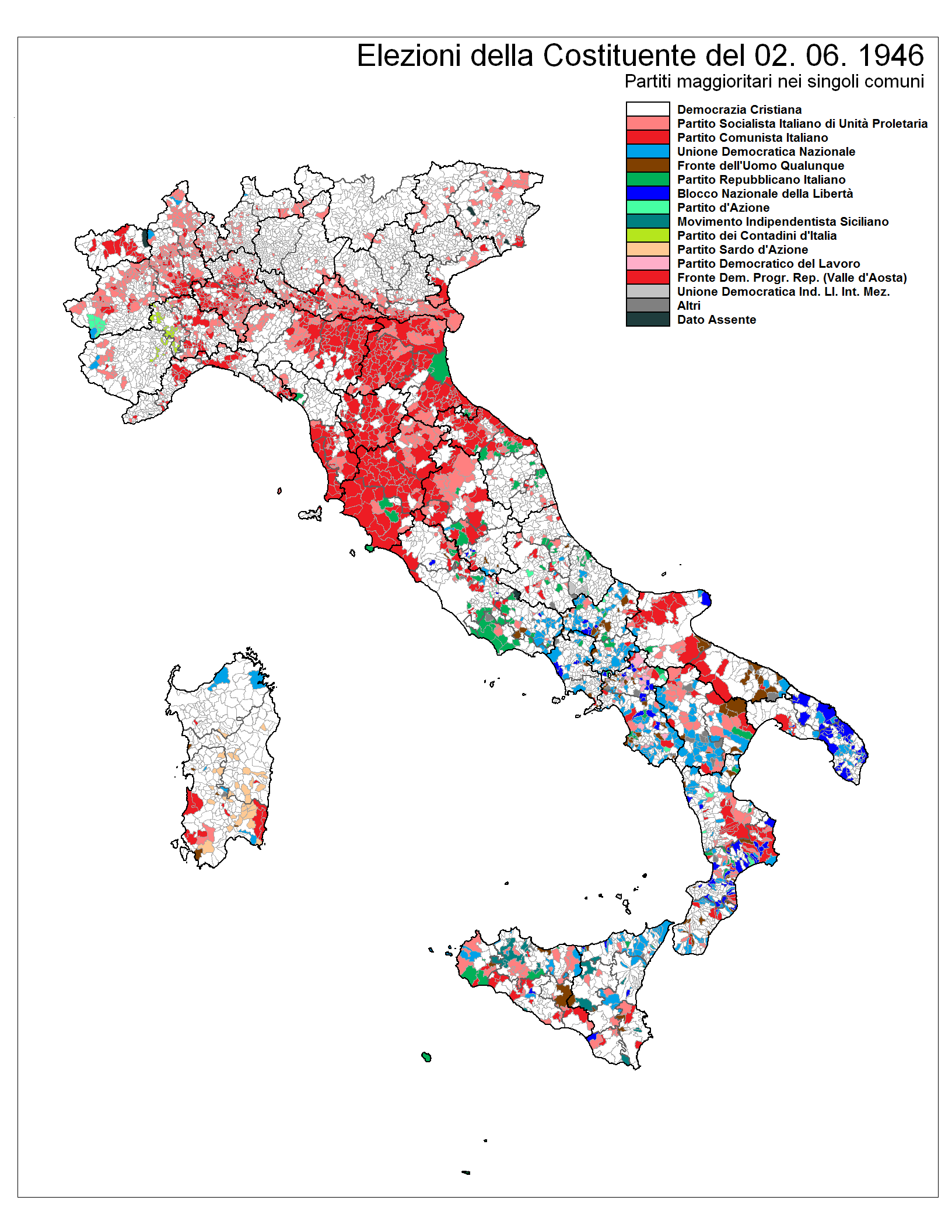 Risultati delle elezioni dell'Assemblea Costituente della repubblica italiana suddivisi per comune